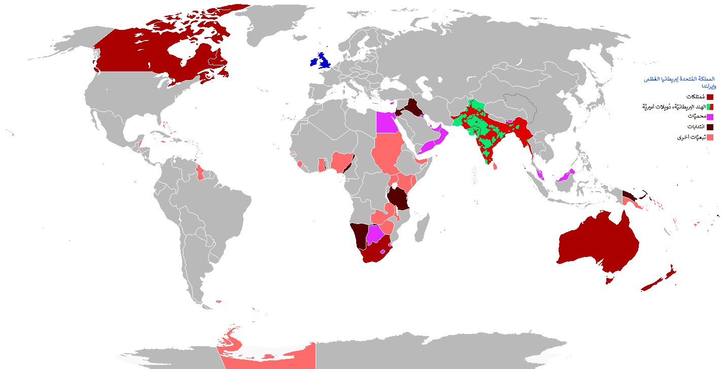 خريطة الإمبراطوريَّة البريطانيَّة في سنة 1919م تظهر فيها مُمتلكات الإمبراطوريَّة ومُستعمراتها ومحميَّاتها وانتداباتها، سواء تلك التي كانت تحكمها بشكلٍ مُباشر أو من خِلال دُولٍ تُنيب عنها.